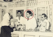 C'est une photo de Radhi Jazi, pharmacien tunisien, en 1955 dans son officine, première officine entièrement tunisienne